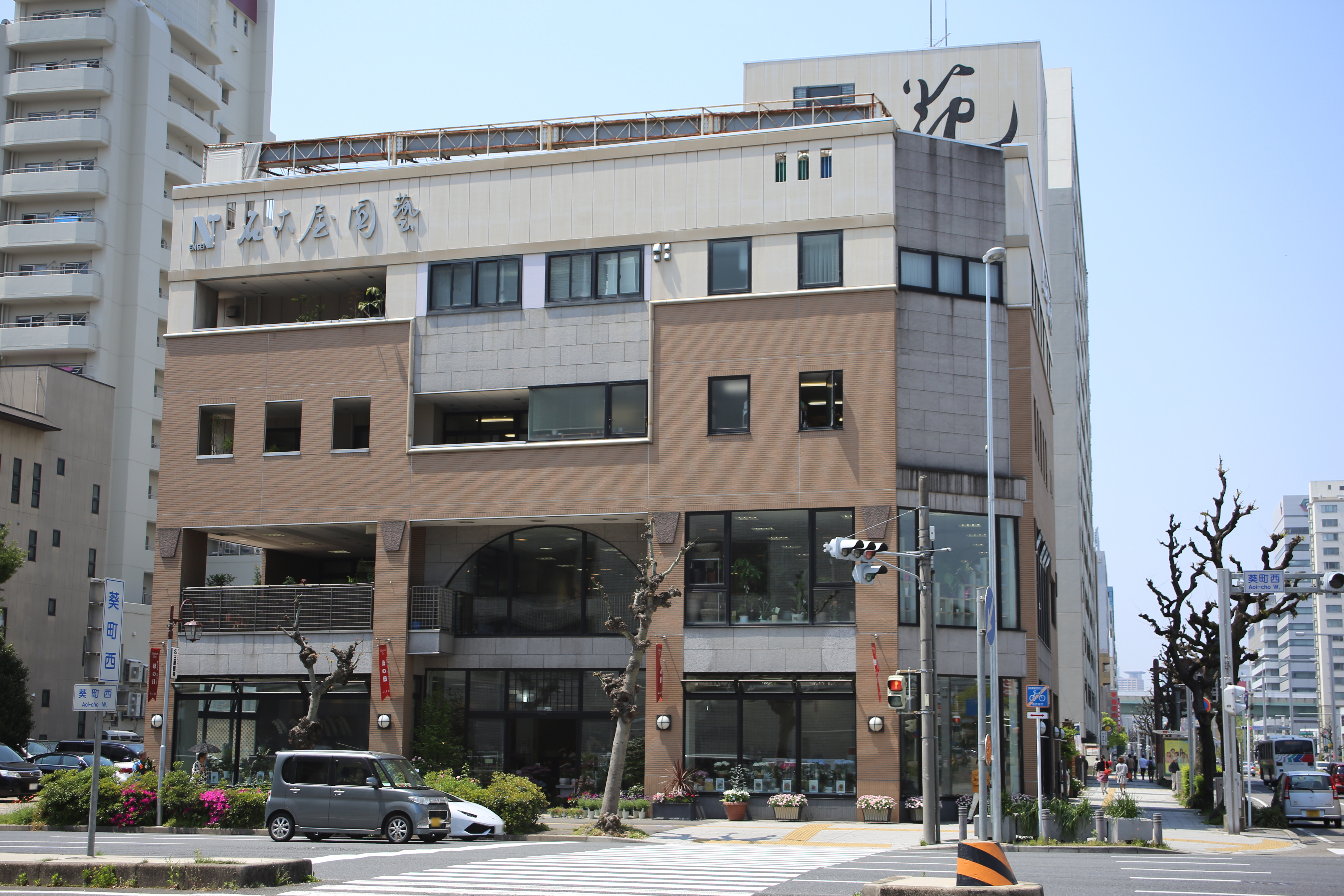 名古屋市中区東桜二丁目の名古屋園芸を東側公道北側より撮影。ただし、自動車ナンバープレートおよび肖像に関してぼかし処理済み。